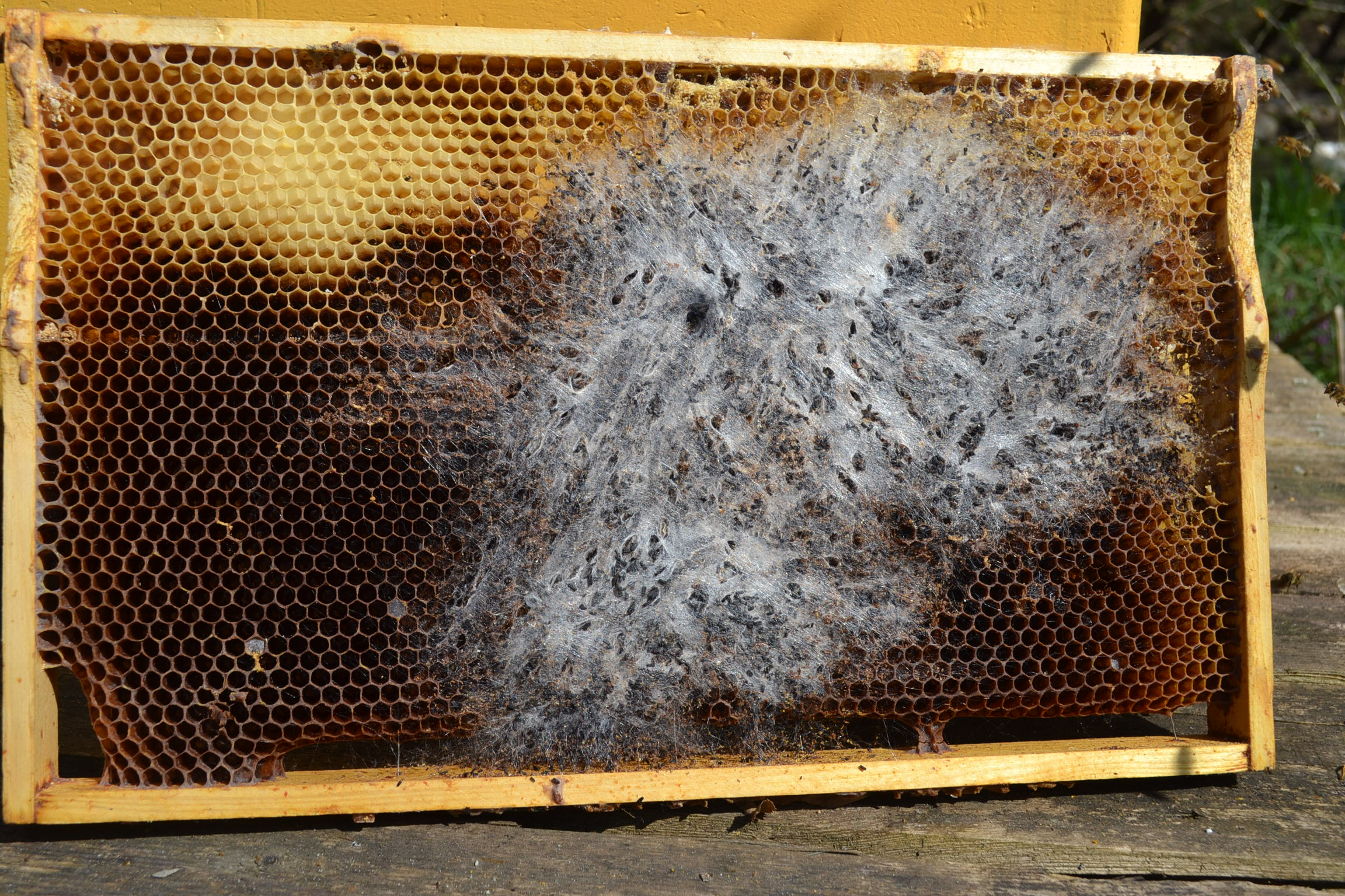 Schadbild der Wachmotte auf einer leeren Brutwabe. Wachsmotten bevorzugen Waben ohne Brut, die zur Lagerung weggestellt wurden.